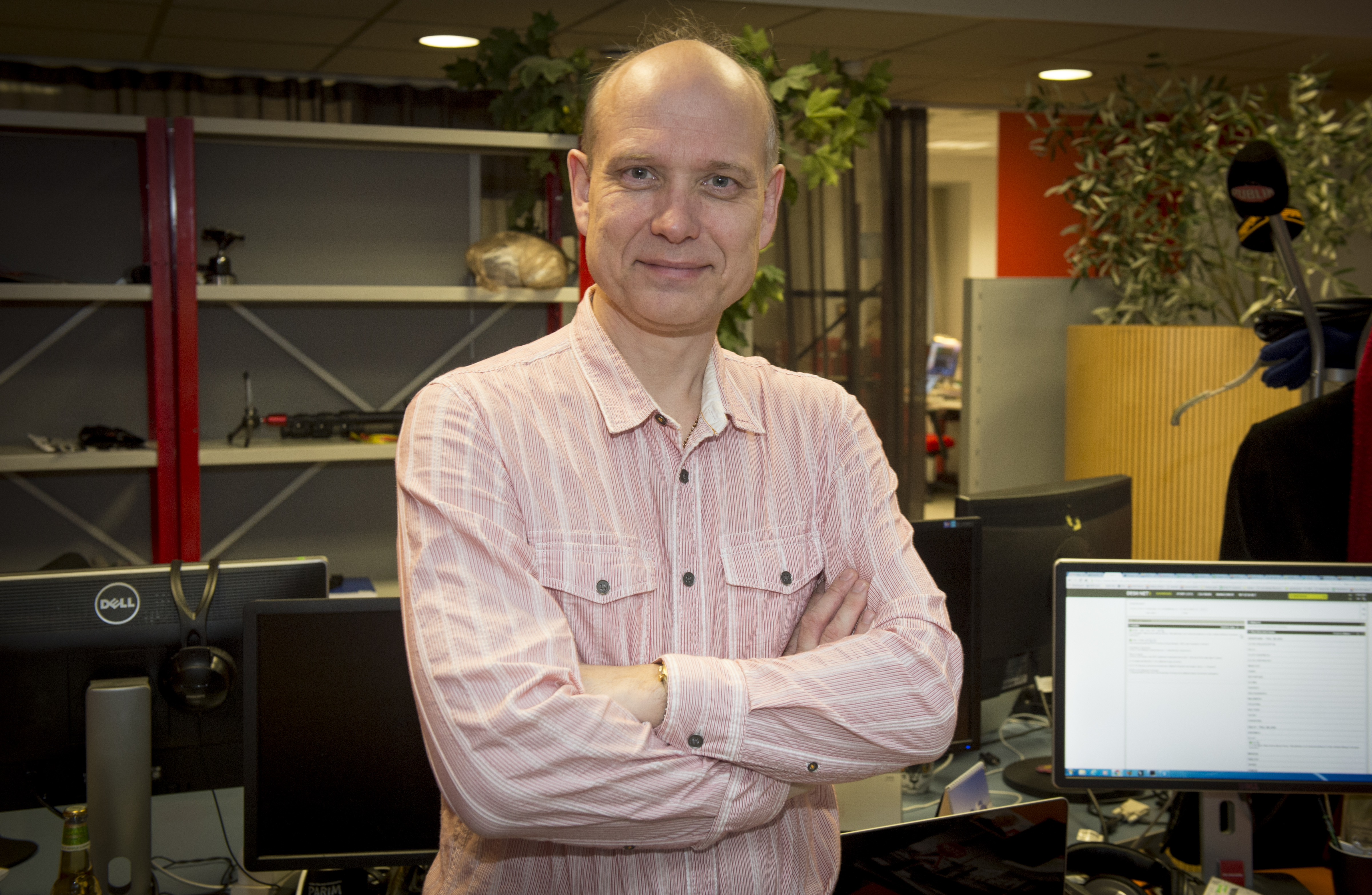 Pekka Erelt